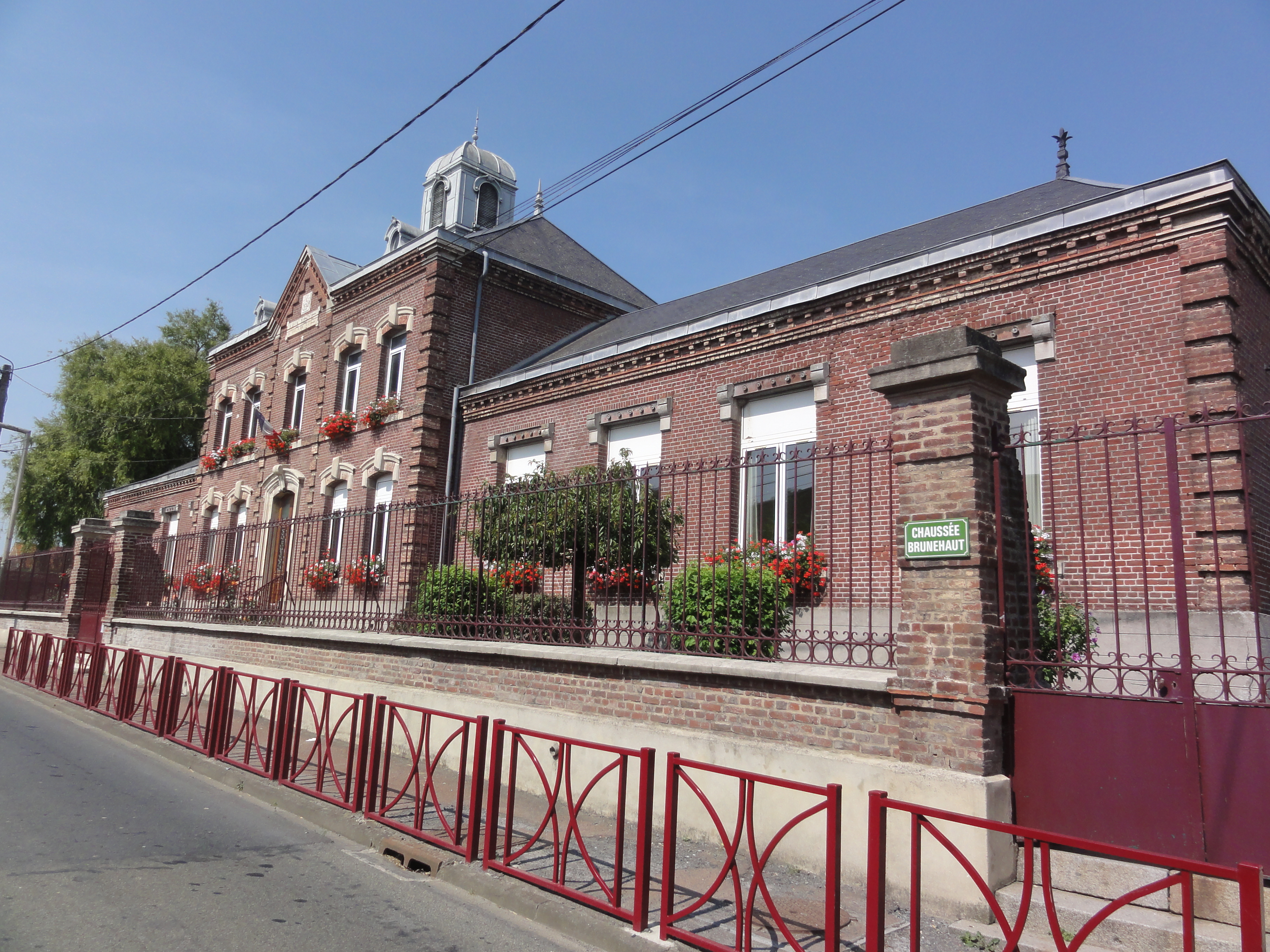 Estrées (Aisne) mairie